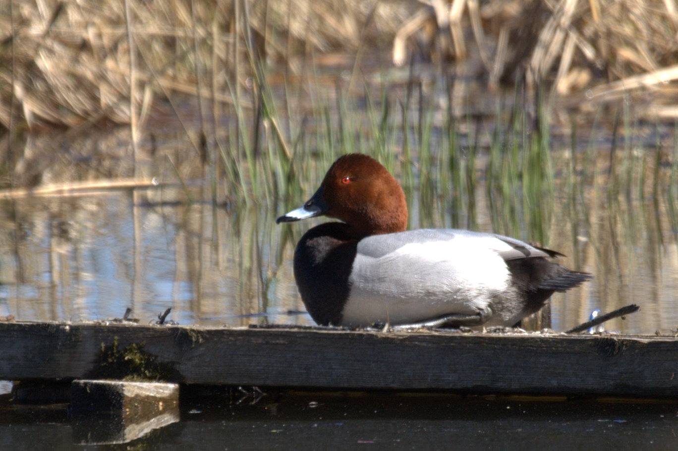 Punasotka koiras Pälkäne Kukkia